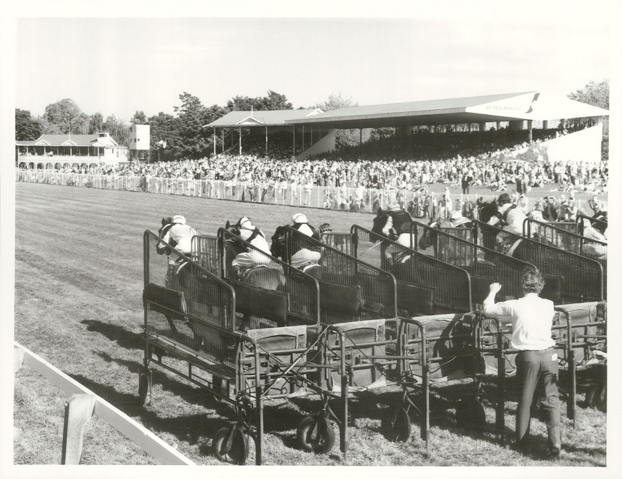 Tauherenikau Easter 1977